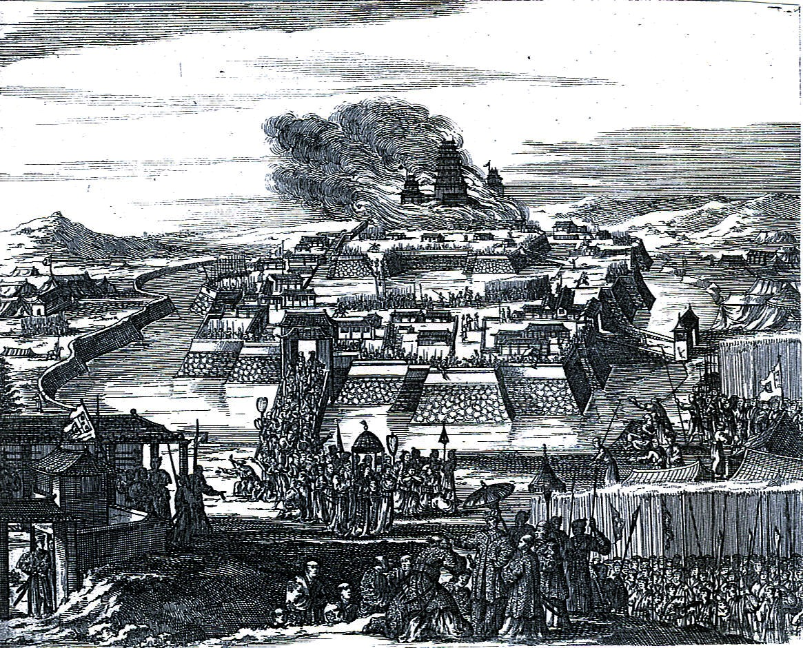 Руйнування замку Осака в 1663 році.